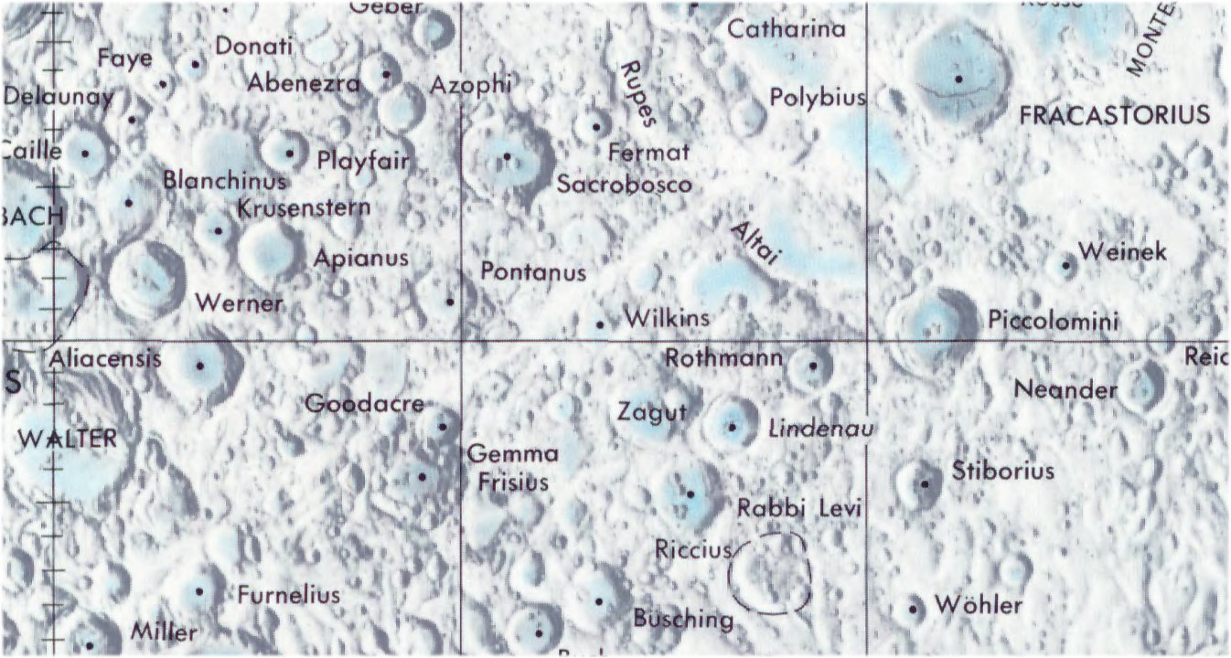 Cráter lunar Pontanus. Localización. (Lunar Chart LPC1. Second Edition)